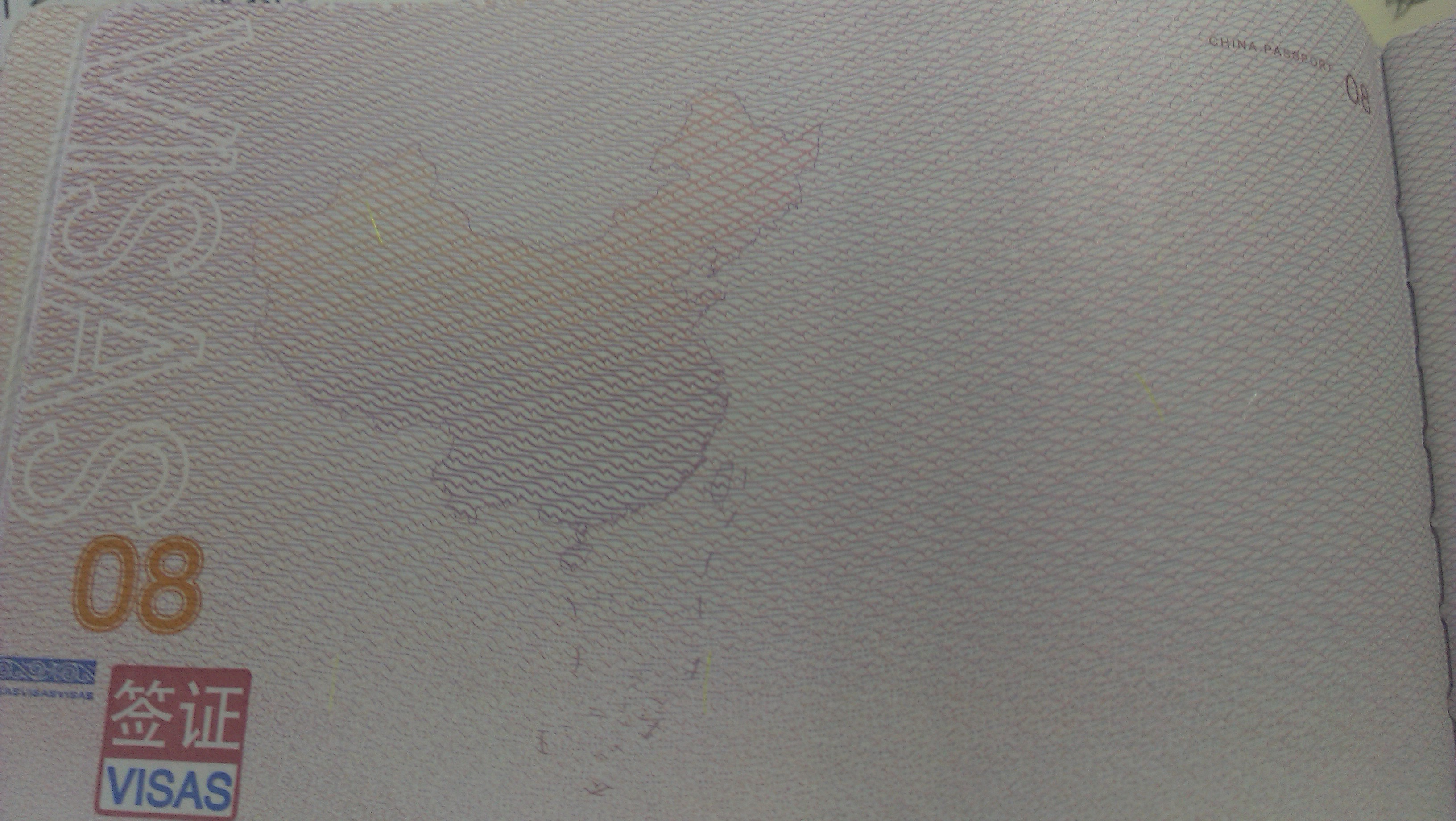 2012年中国新版护照风波中涉及的中华人民共和国版图 Includes version of famous Nine-dotted line